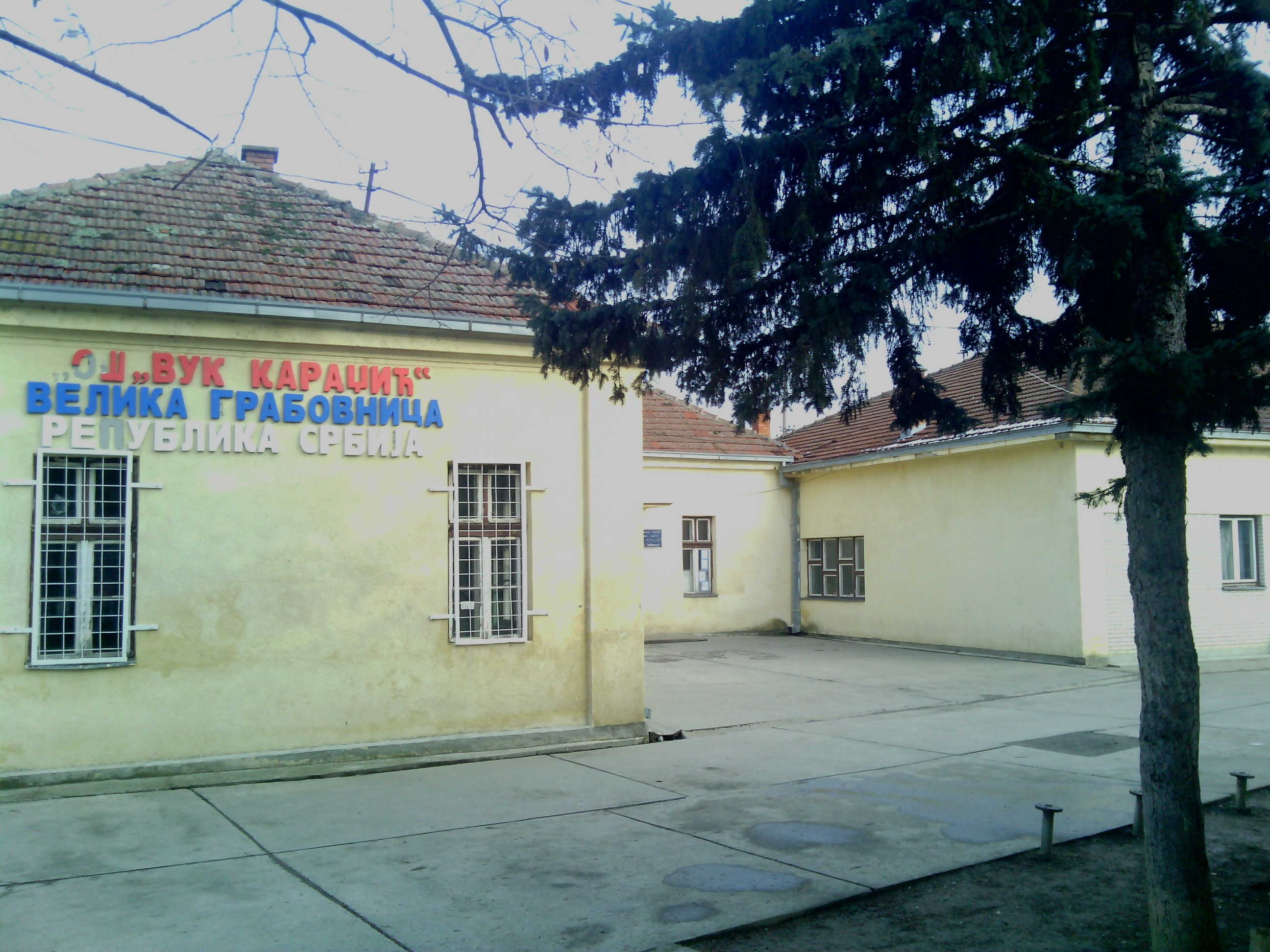 Основна школа "Вук Караџић" Велика Грабовница-Лесковац